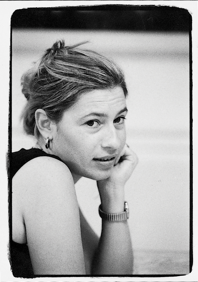 אורלי ברונשטיין